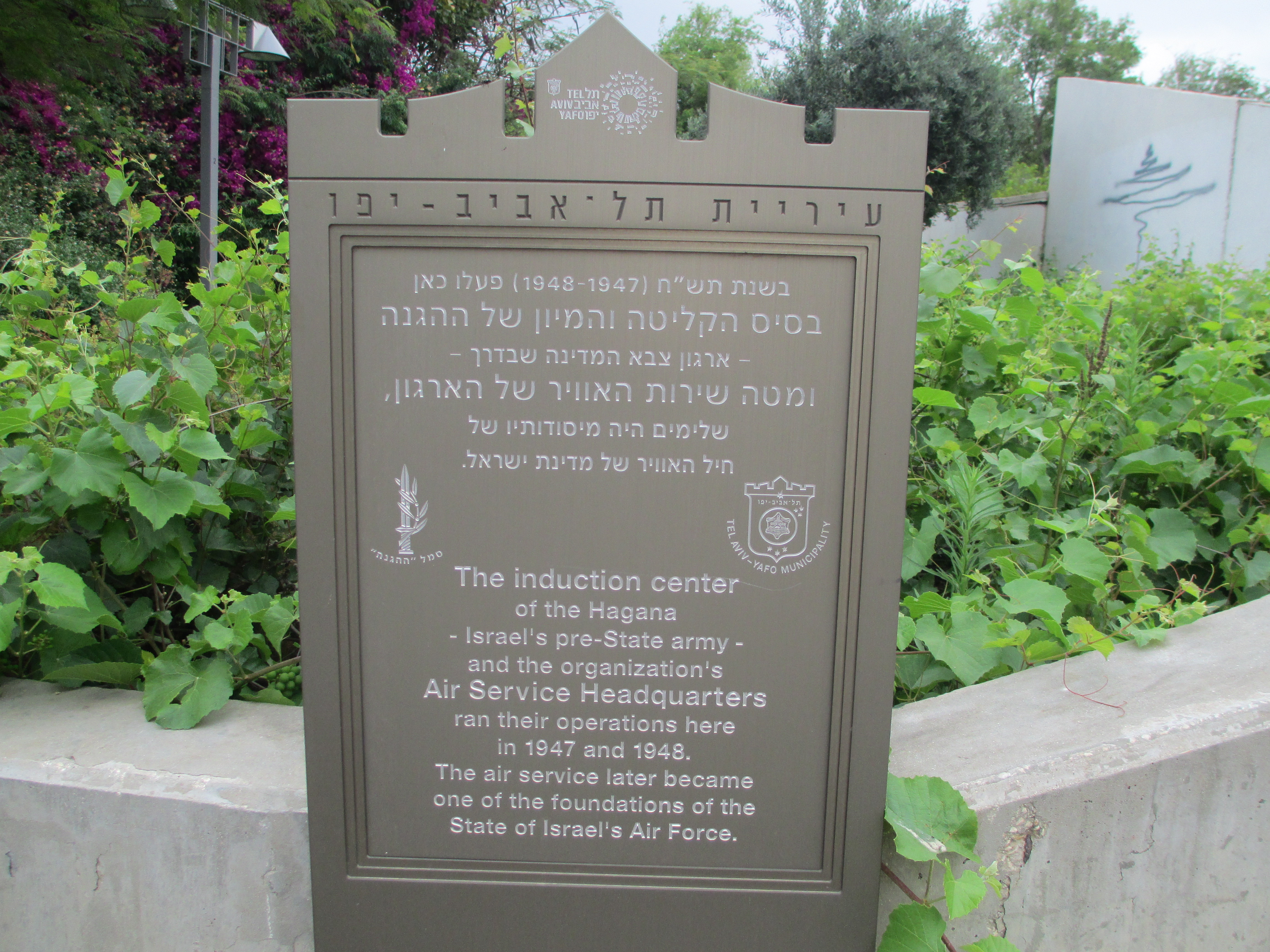 לוחית זיכרון למחנה קריית מאיר בפינת הרחובות דה וינצ'י וברקוביץ, בכניסה לגן דובנוב בתל אביב